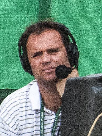 Kaplár F. József és Köves Gábor a 2011-es Budapest Open teniszversenyen, a Római Teniszakadémia centerpályájának kommentátorállásában (Római Teniszakadémia, Budapest)